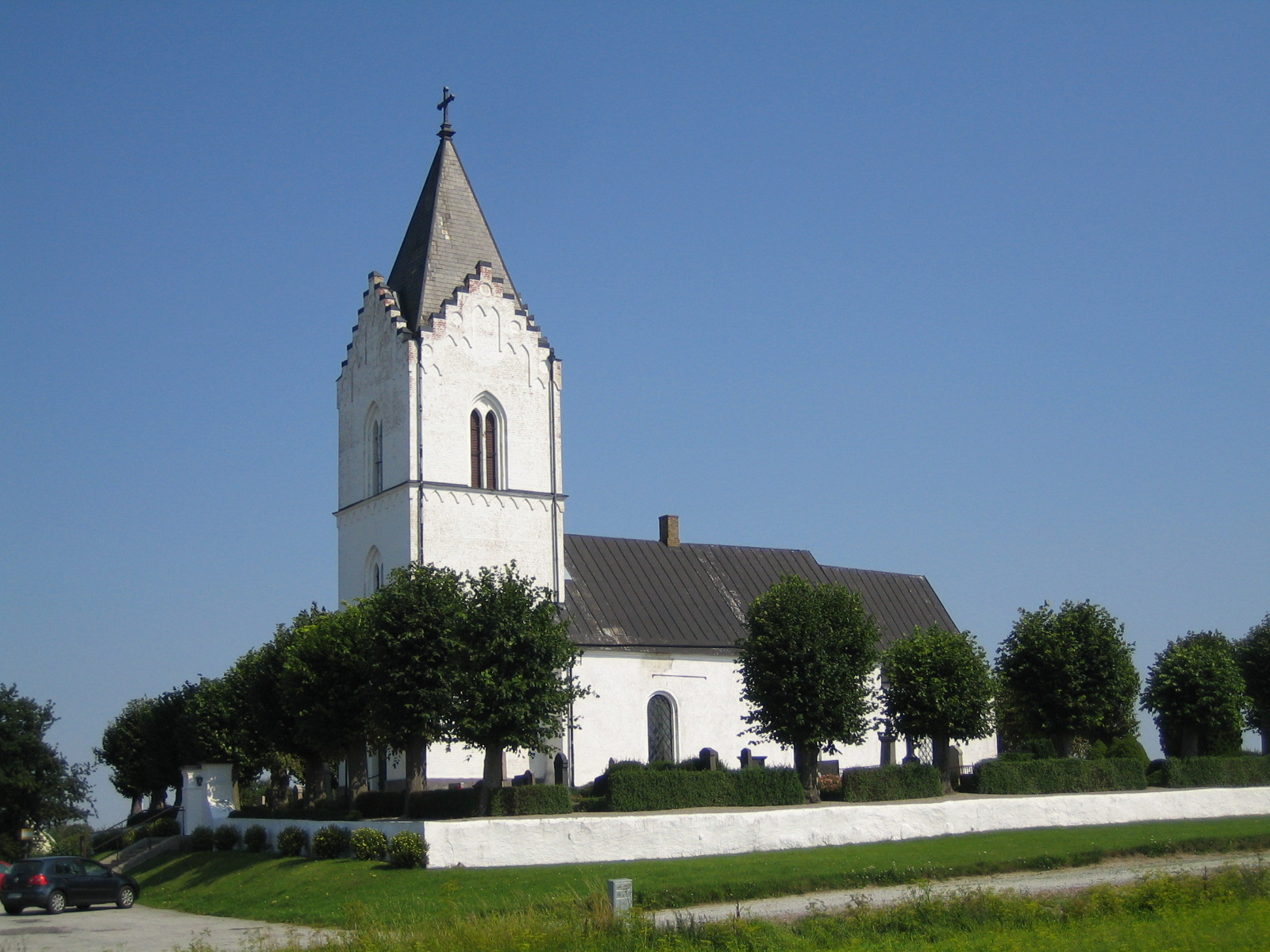 Särslövs kyrka